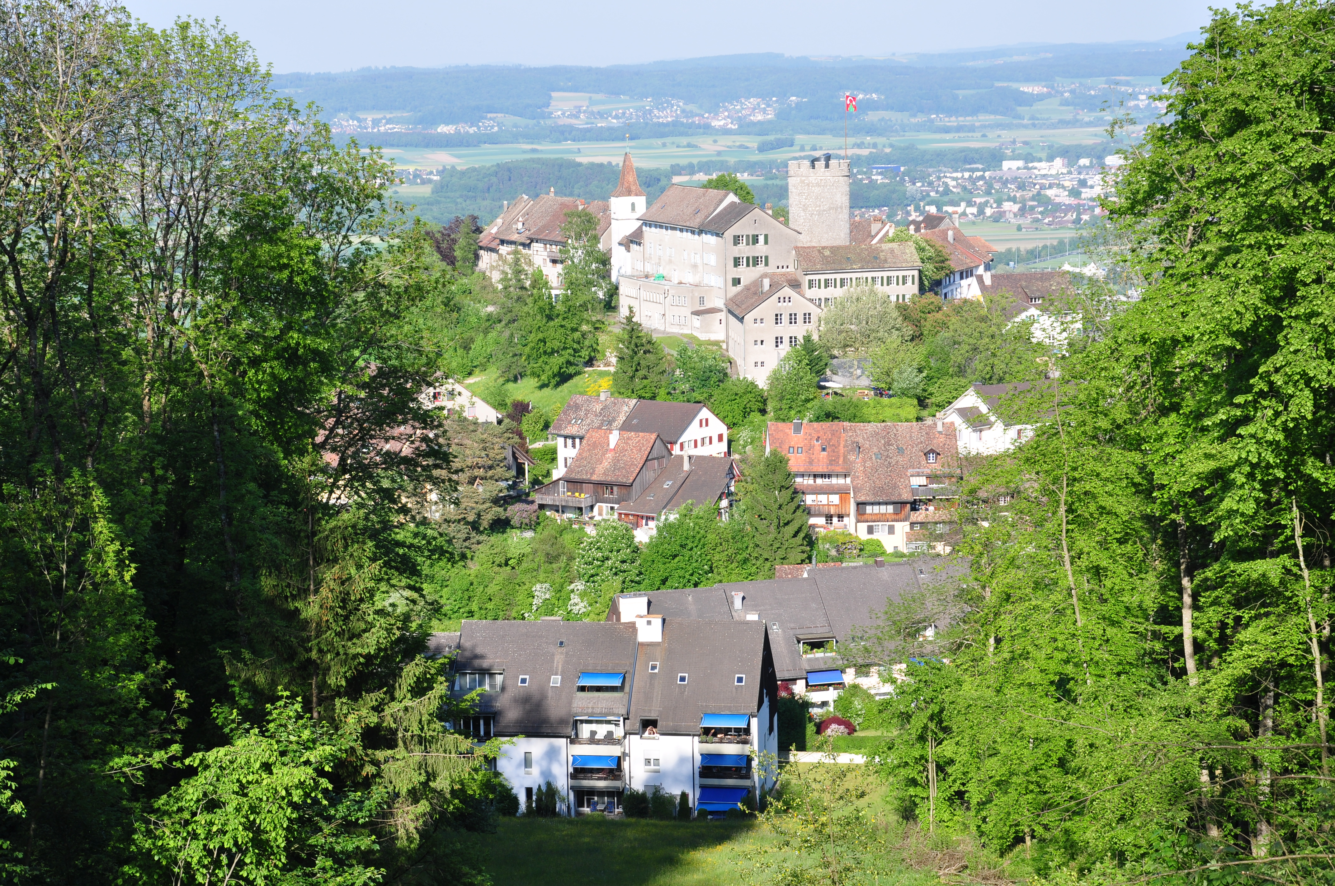 Regensberg as seen from Lägern (Switzerland)